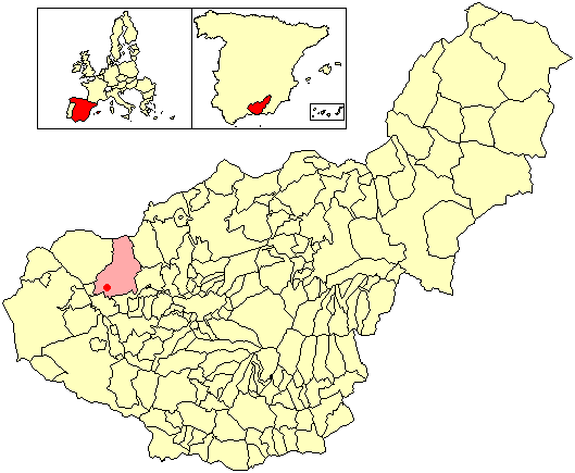 Situación de la localidad de Brácana (en el municipio de Íllora) respecto a la provincia de Granada, en España.